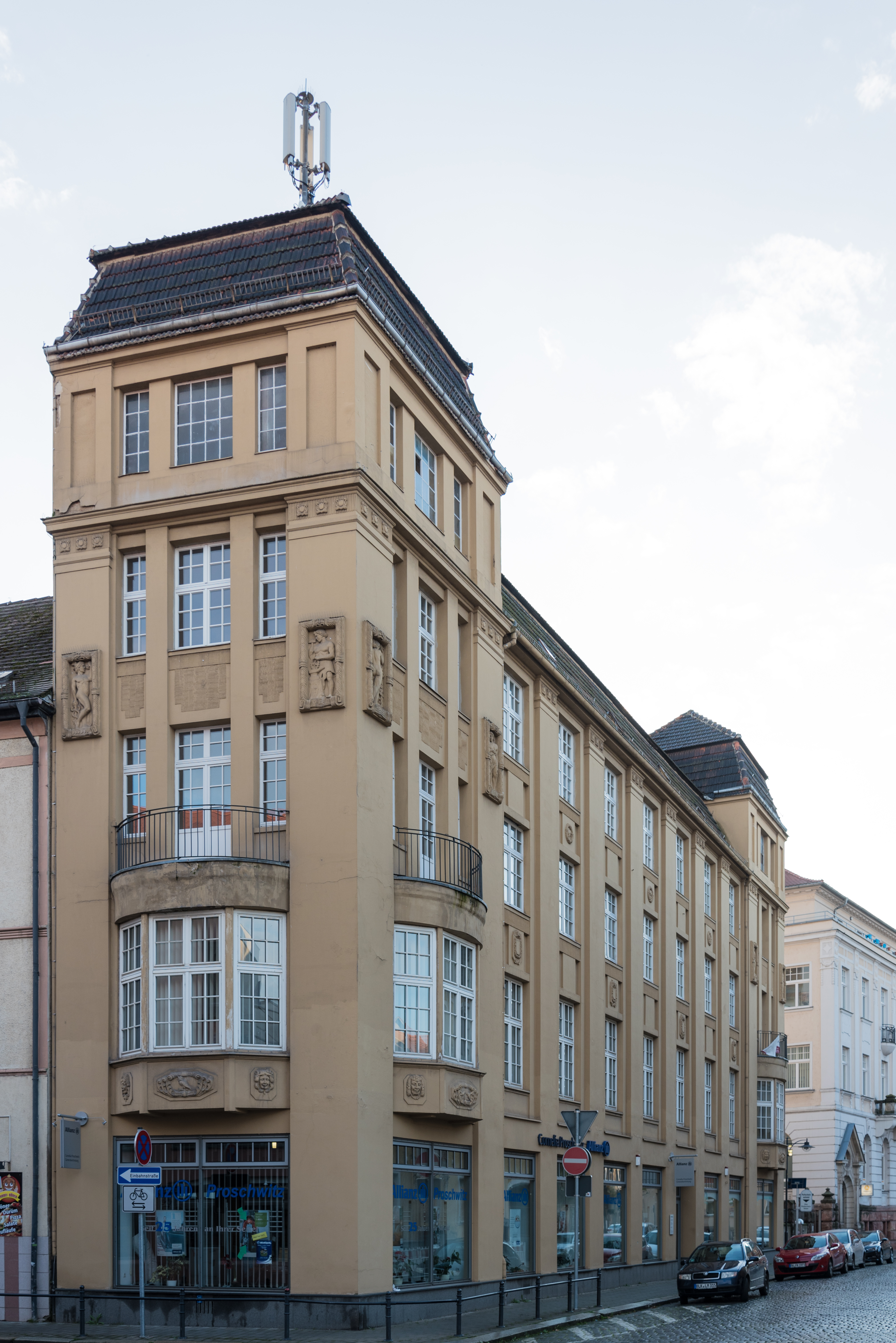 Weißenfels, Jüdenstraße 50